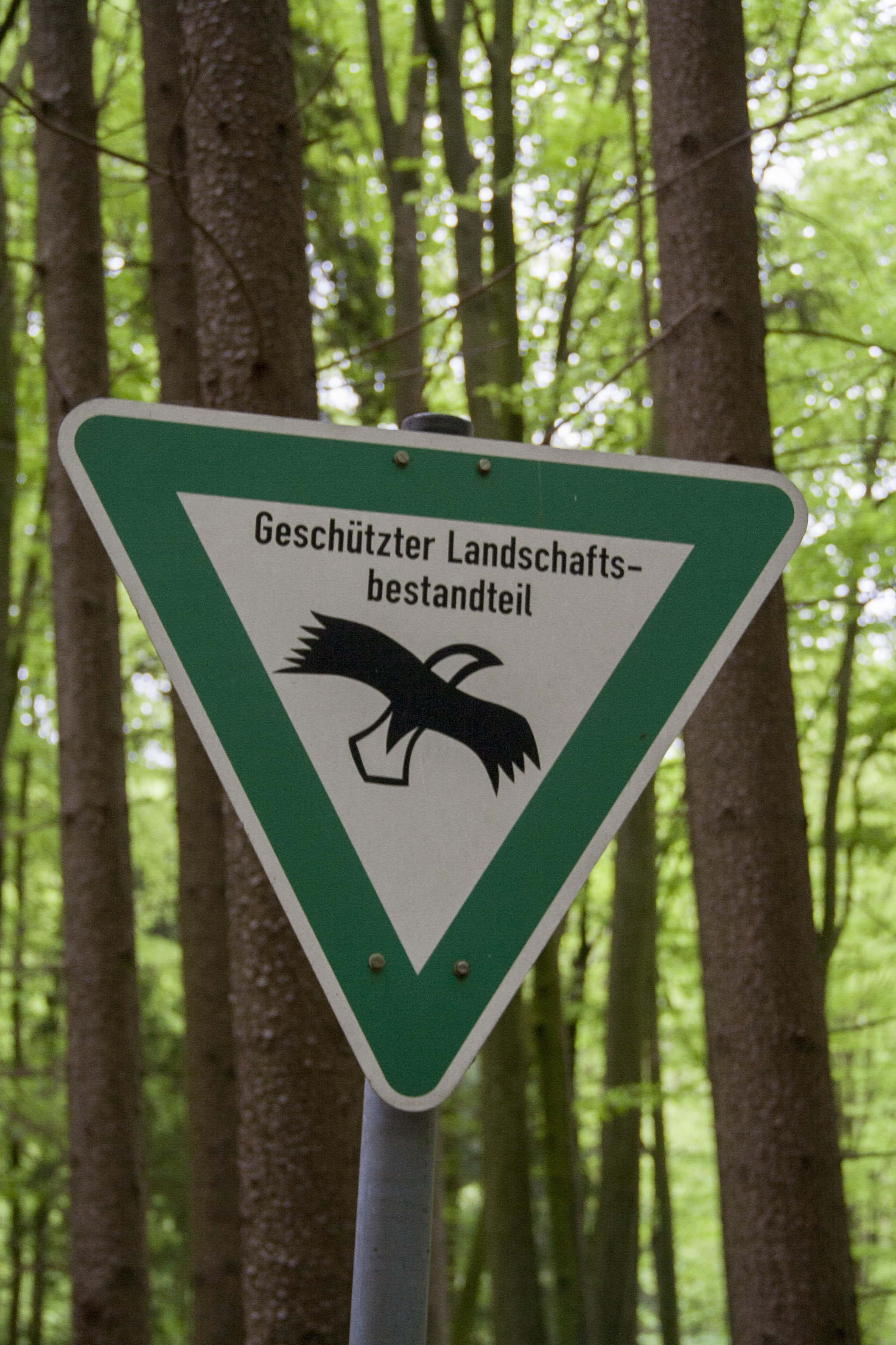 Sinterterrassen, Untermässing, Geschützter Landschaftsbestandteil, Greding, Geotop, Naturpark Altmühltal